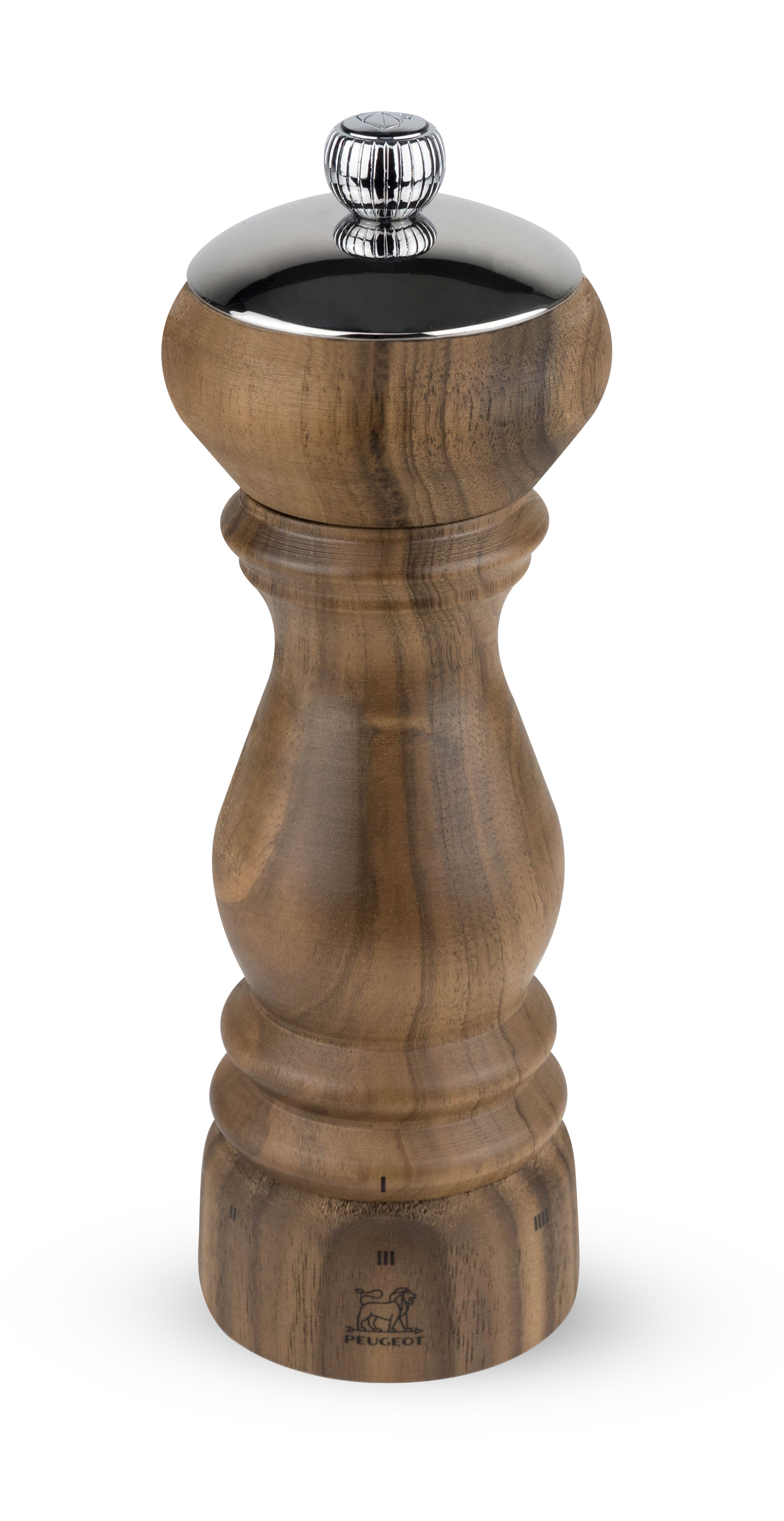 Moulin Paris icone